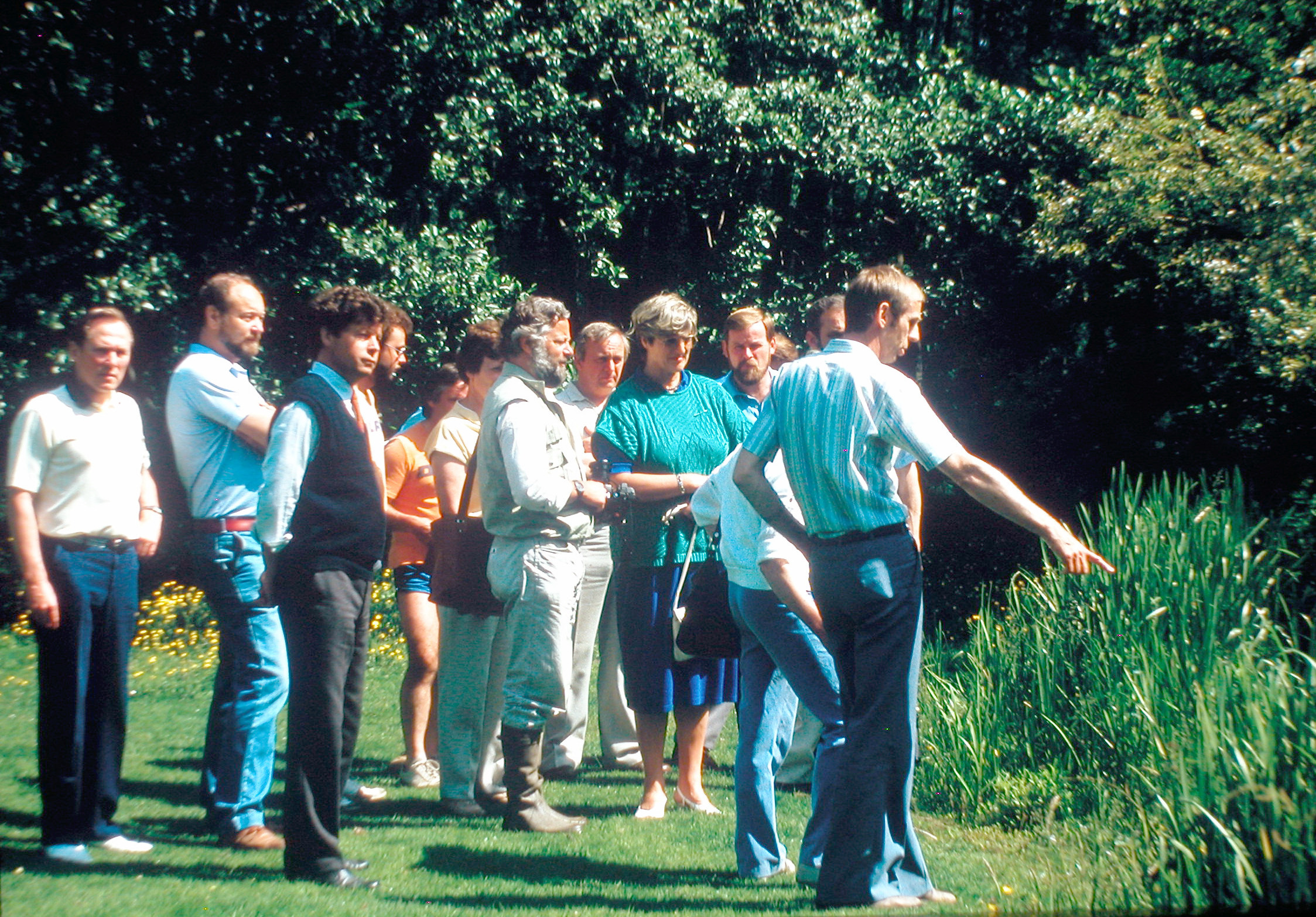 Der Landschaftsbeirat der Stadt Mülheim an der Ruhr 1985 im Einsatz bei der Einrichtung des Naturschutzgebietes „Kocks Loch“ (später aufgegangen im größeren Naturschutzgebiet „Saarn-Mendener Ruhraue“). Im grünen Pulli die Oberbürgermeisterin Eleonore Güllenstern.